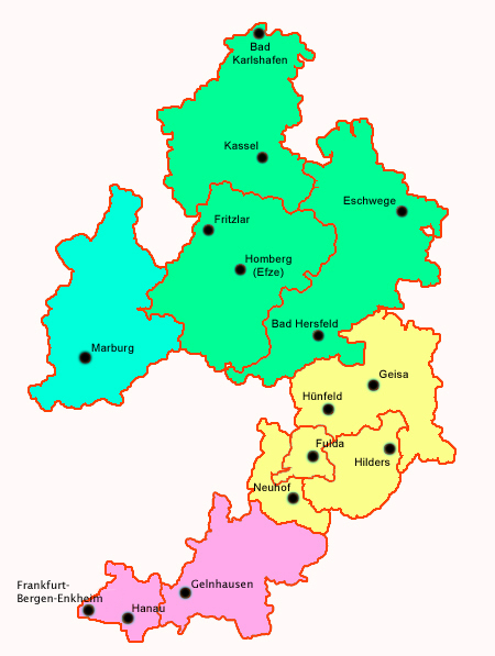 Die Katholische Erwachsenenbildung im Bistum Fulda hat ihren Sitz im Bonifatiushaus Fulda. Vom Regionalhaus Adolph Kolping in Kassel, dem Bildungshaus Salmünster und dem Jojanneshaus in Amöneburg werden die verschieden Regionen betreut.